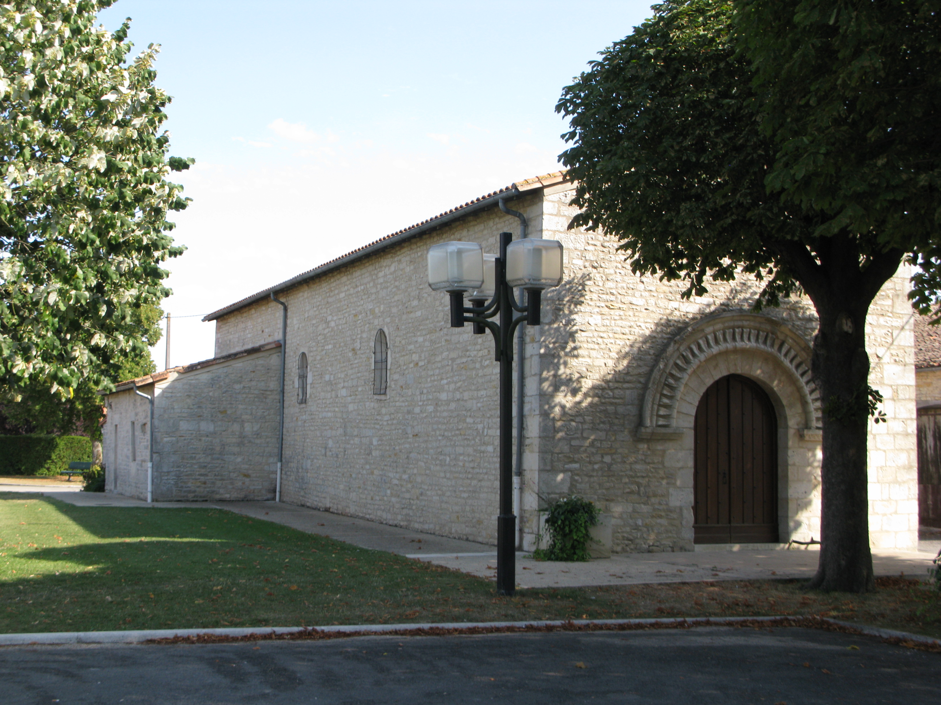 Église de Granzay